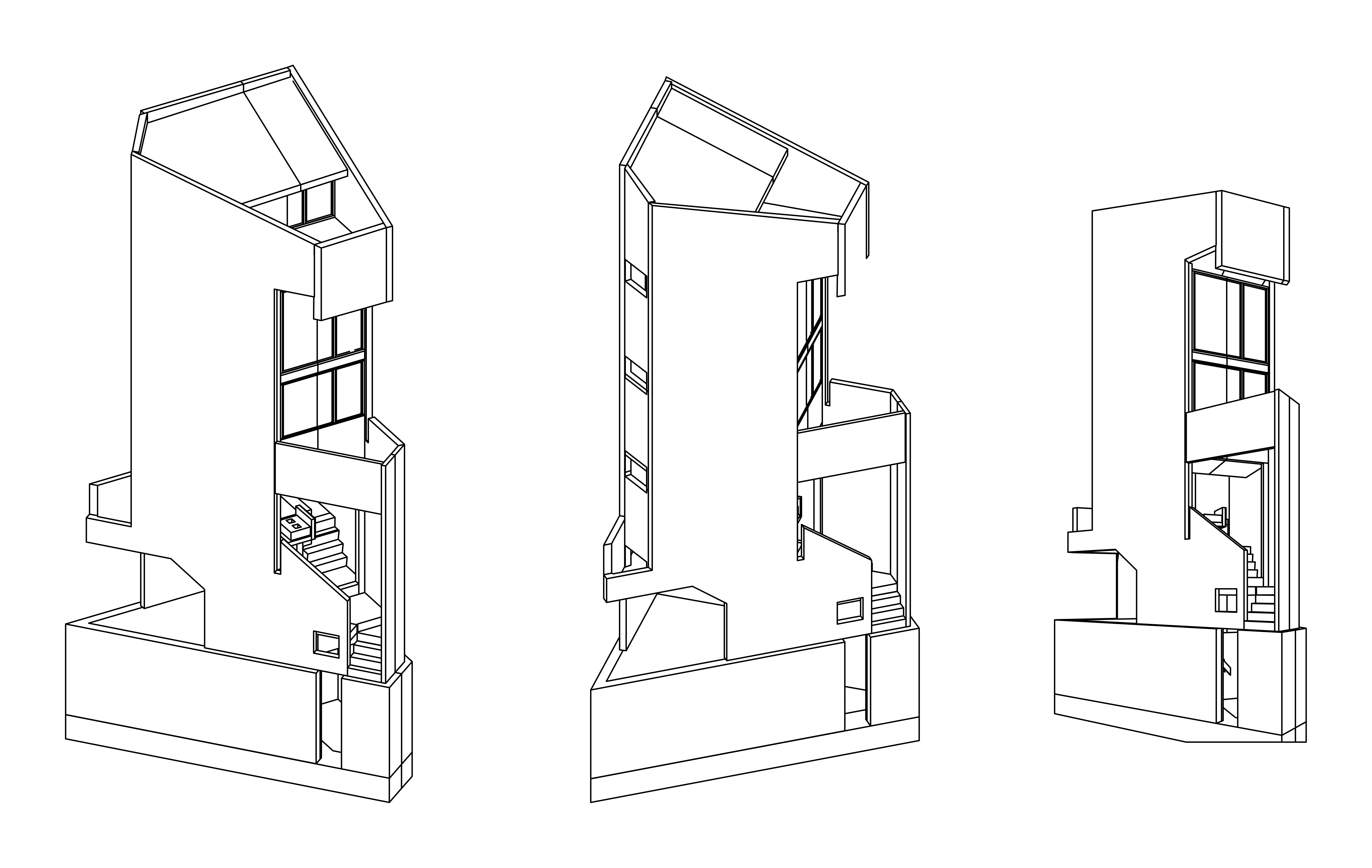 αξονομετρική και προοπτική προβολή οικίας